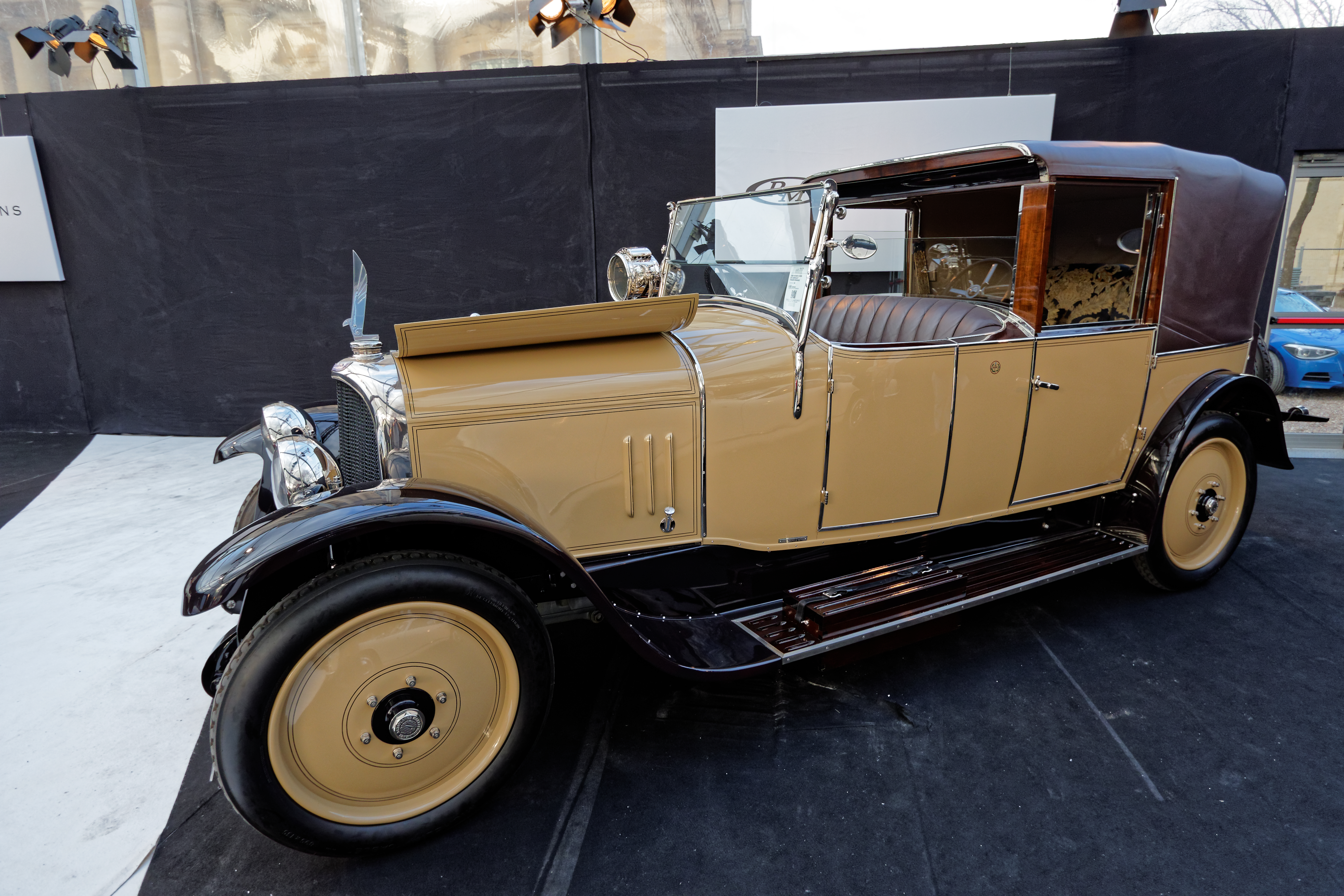 La vente aux enchères RM auctions aux pied des Invalides à Paris le 4 février 2015.